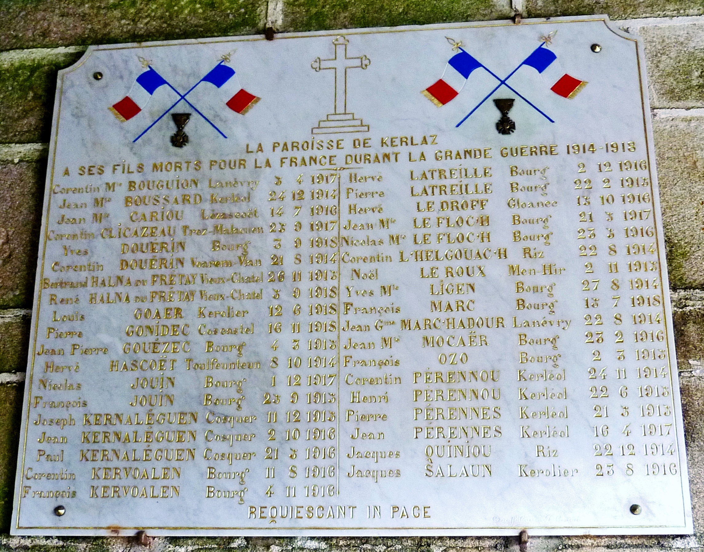 Plaque commémorative des morts de la paroisse de Kerlaz pendant la Première Guerre mondiale (elle se trouve dans le porche de l'église Saint-Germain).